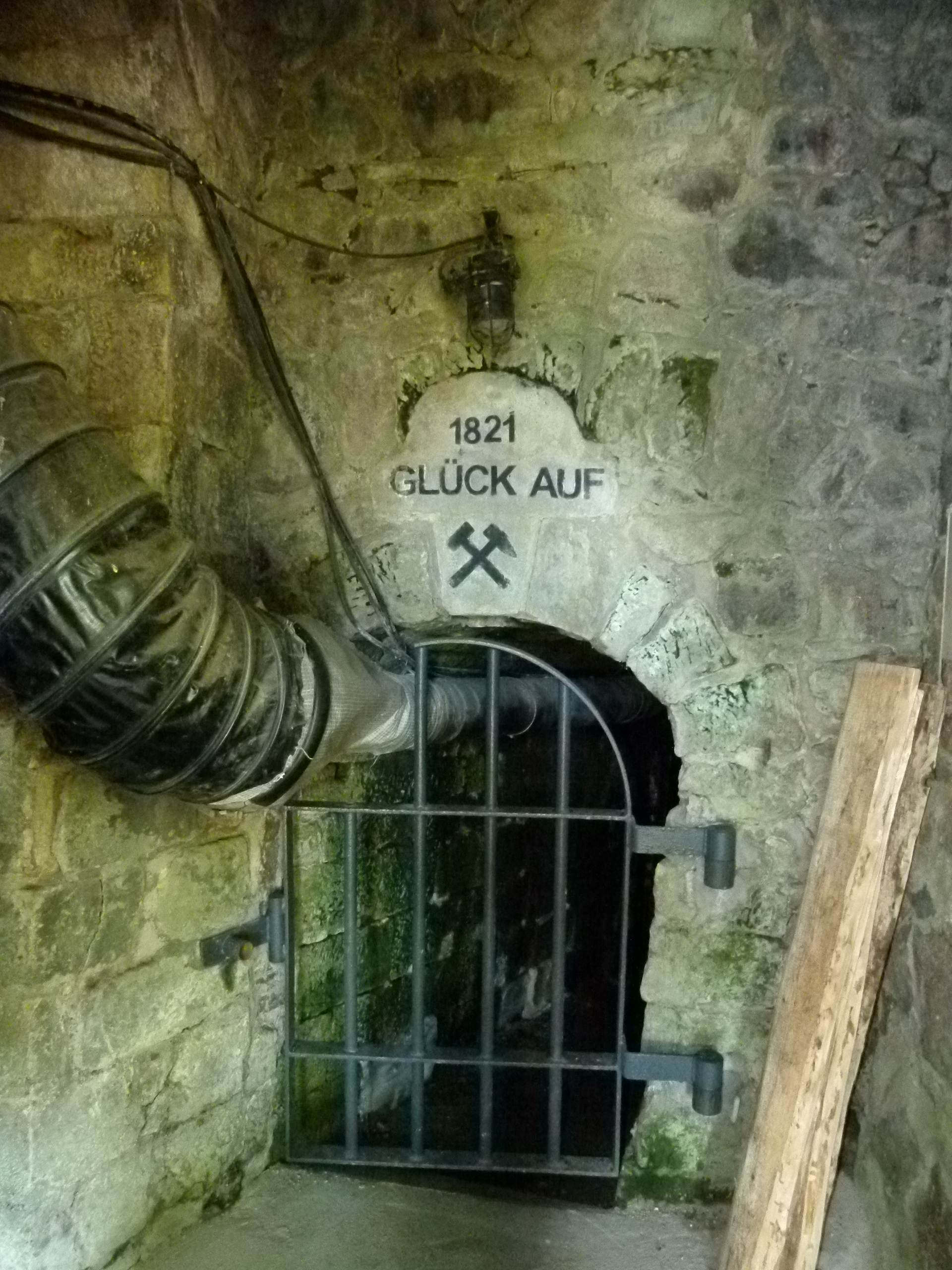 Mundloch, Technisches Denkmal - Besucherbergwerk, Schloss Burgk, Freital